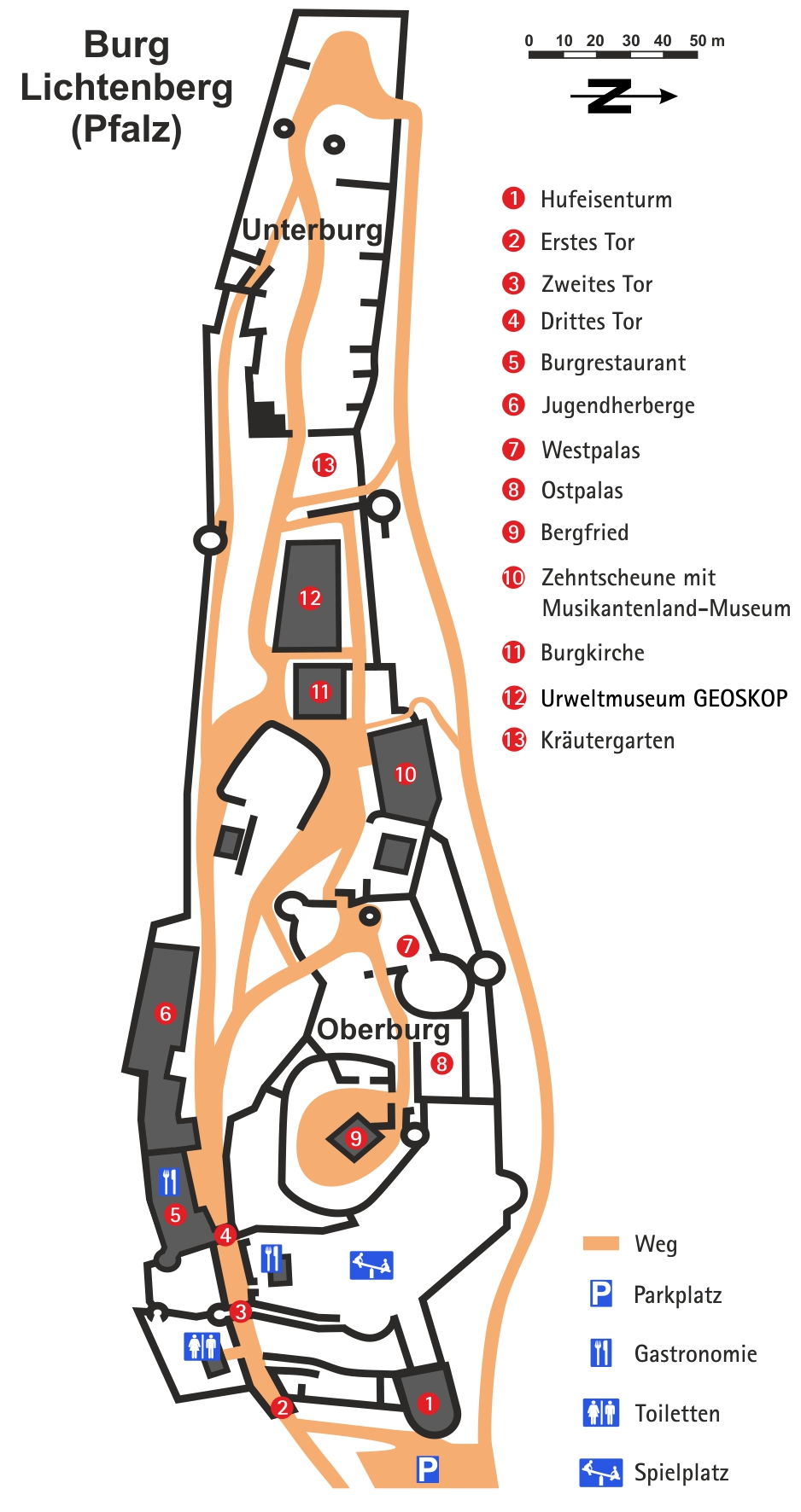 Vereinfachter Plan von Burg Lichtenberg (Pfalz)